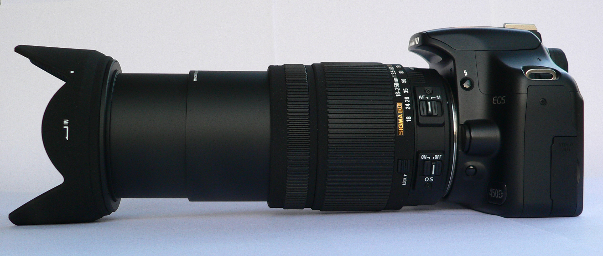 Canon EOS 450D (Seitenansicht) mit Objektiv: SIGMA 18-250mm F3.5-6.3 DC OS HSM (max. Telestellung, mit tulpenförmiger Gegenlichtblende)